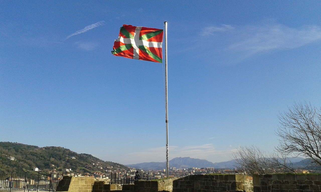 Ikurriña Donostiako Urgullen Interlingua: Basque flag on Urgull, Donostia (Basque Country)